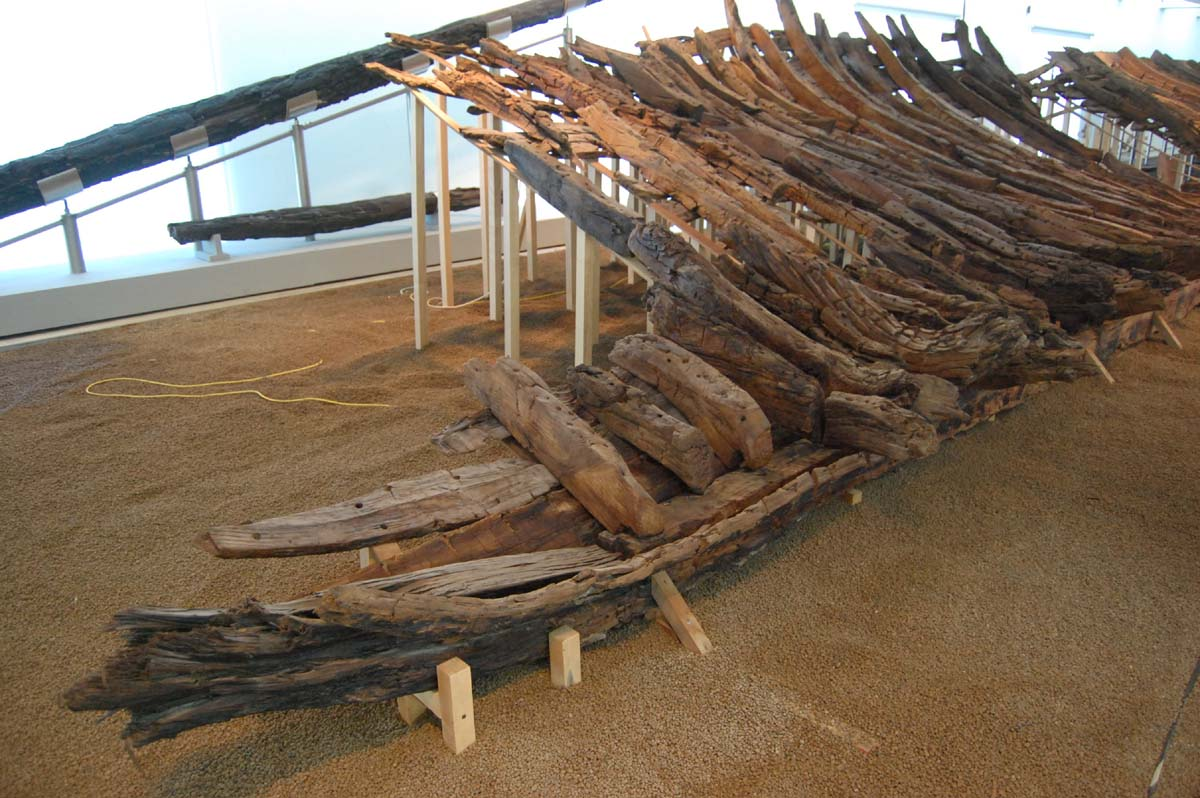 Relitti navi romane Museo di Olbia